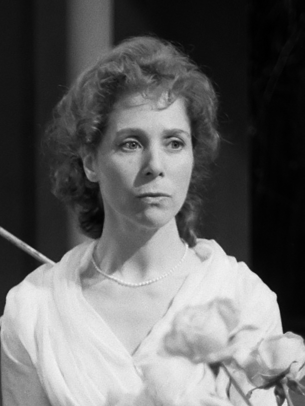 Televisiespel "Zoals jij mij wilt ", Philippe la Chapelle en Heleen Pimentel 27 april 1960